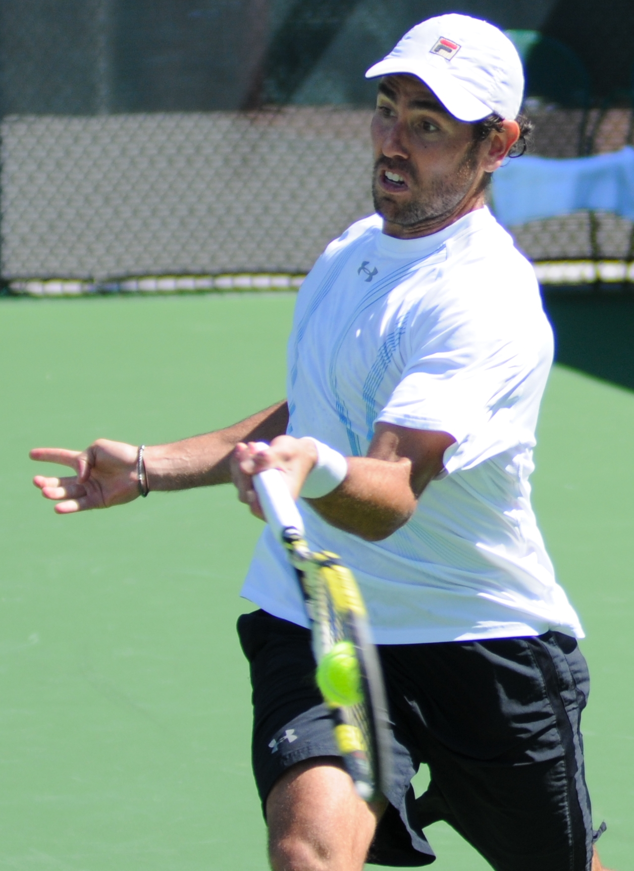 BNP Paribas Open 2013